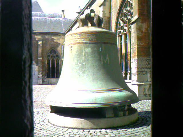 De oude Grameer van de Sint Servaas basiliek in Maastricht. Foto is genomen in augustus 2006 via het raam in de Kruisgang. De klok zelf staat in de Pandtuin.